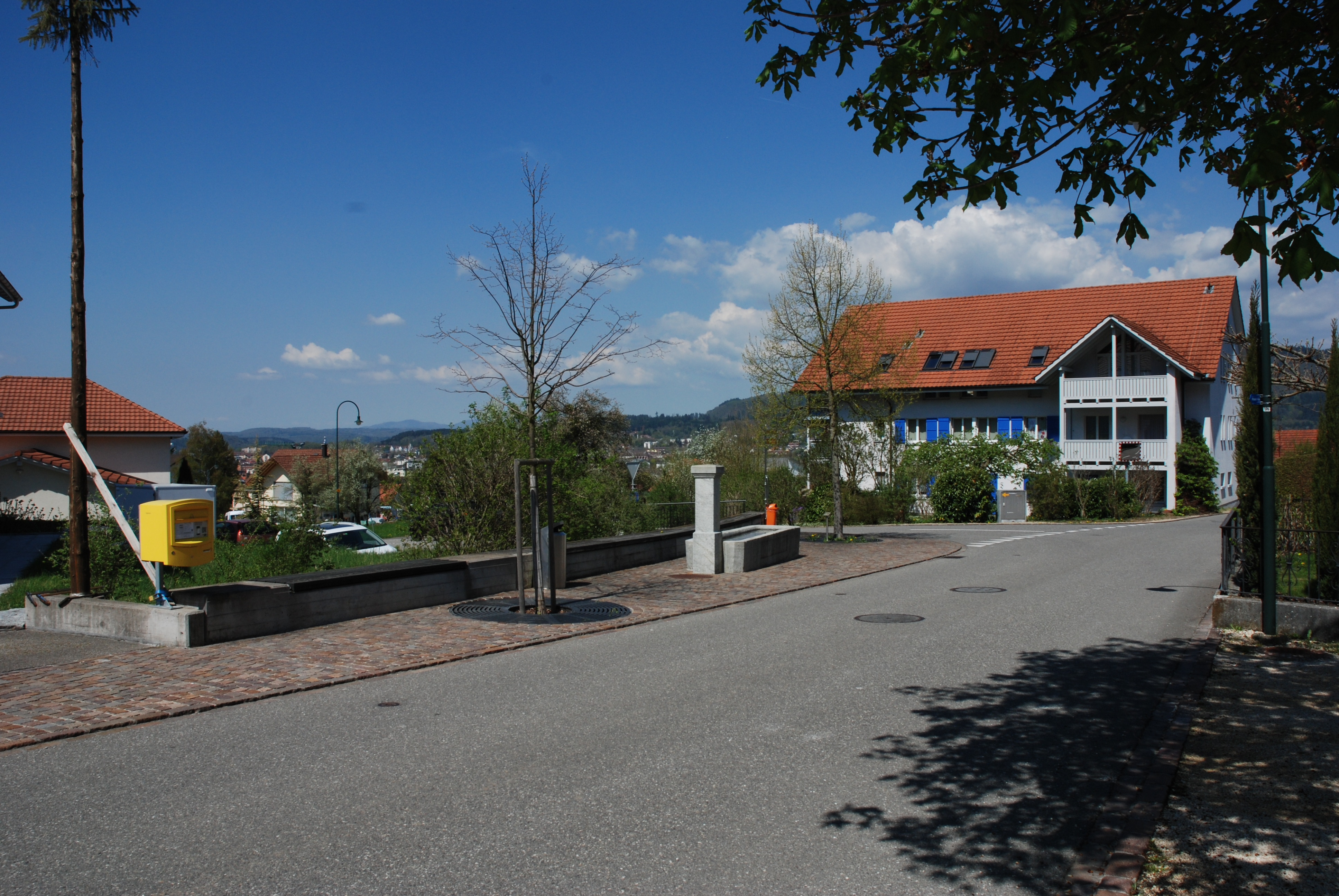 Münchenwilen AG Dorfbrunnen